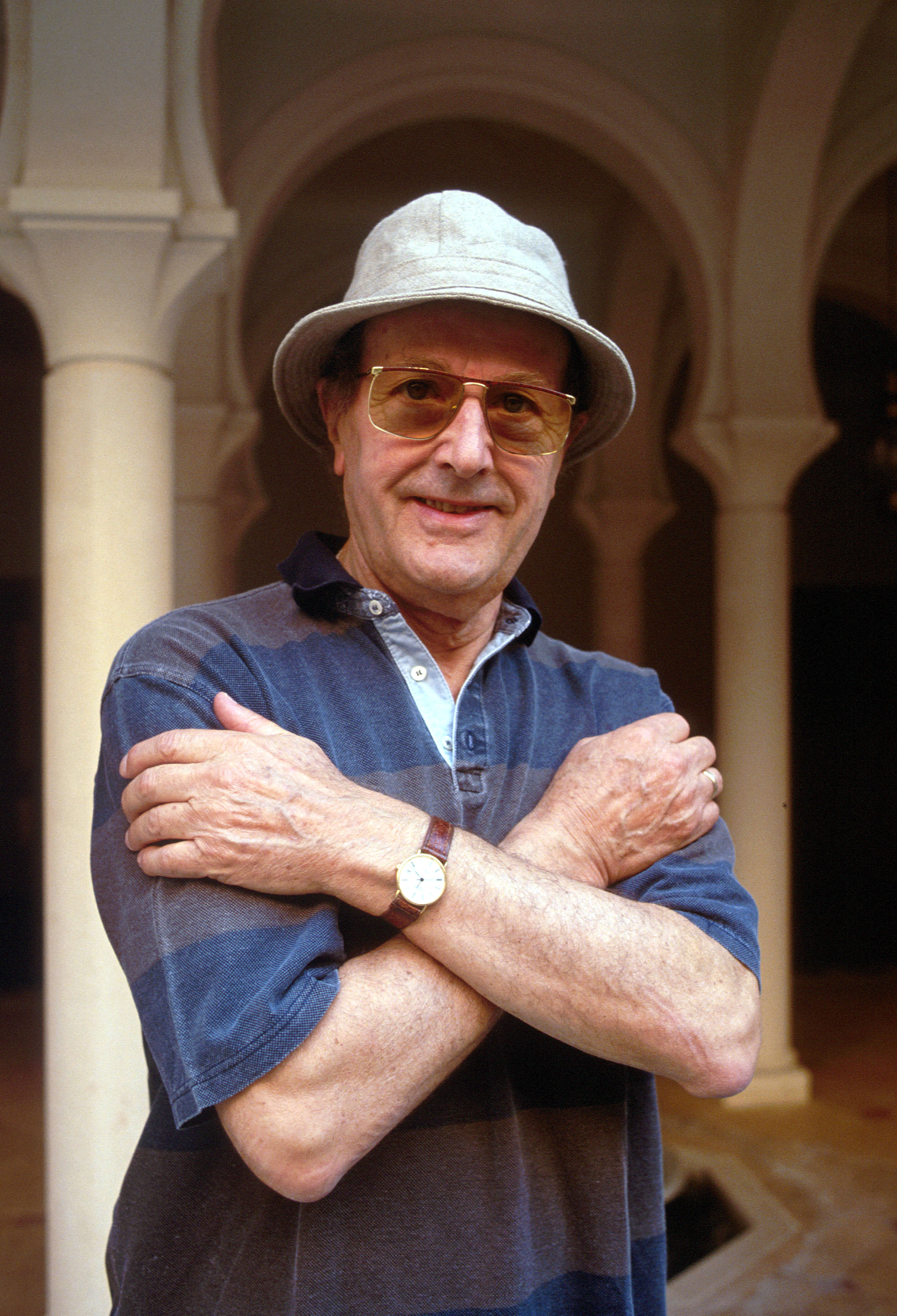 Il regista portoghese Manoel de Oliveira alla Mostra del Cinema di Venezia del 1991